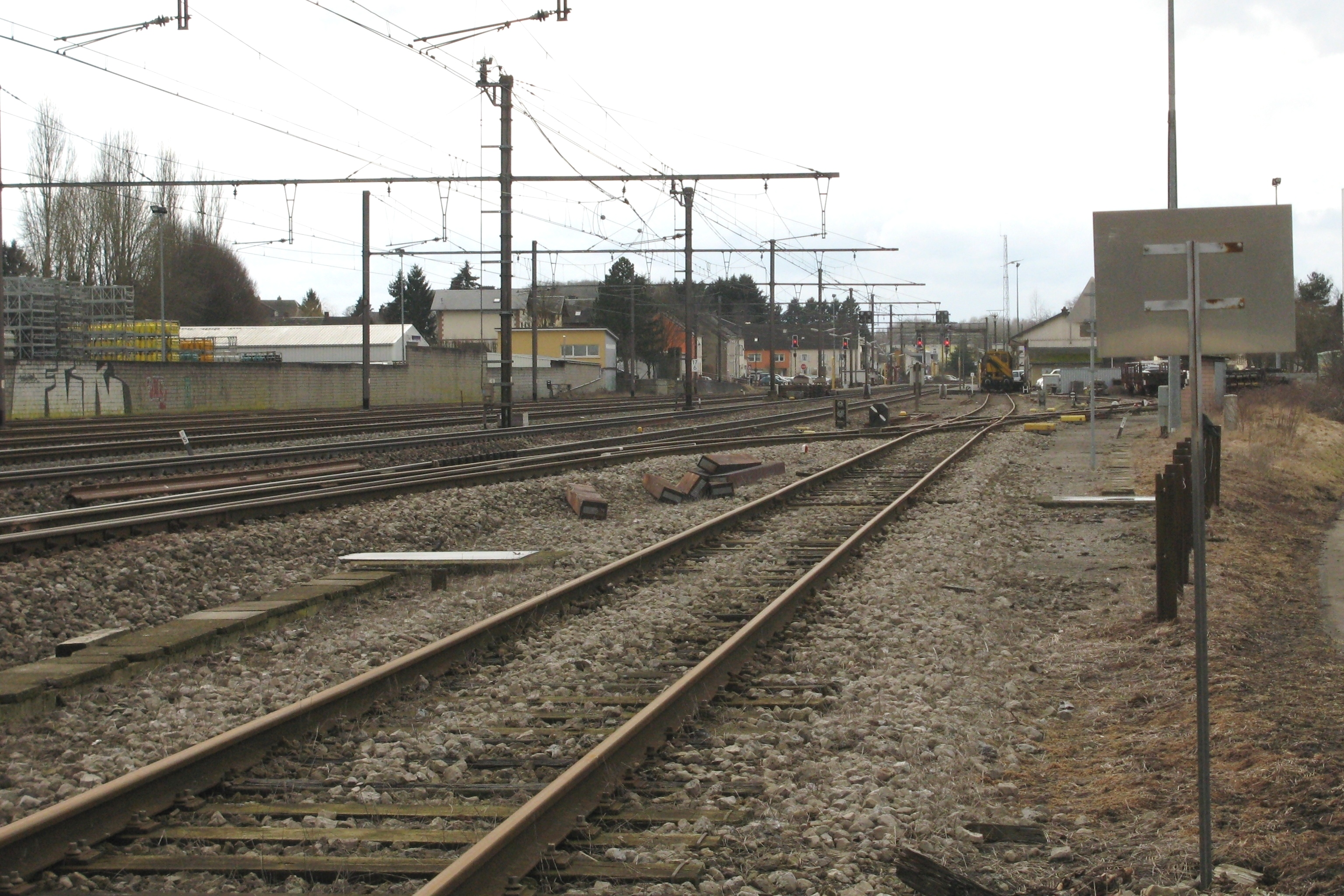 D'Klengbettener Gare, vum Päiffendeckel aus gesinn. Riets d'Gleis vun der Bretell vun der Atertlinn.